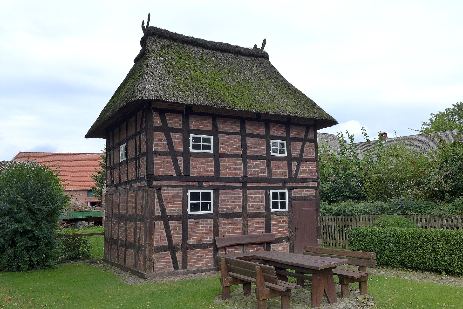 Bartelsdorf, Ortsteil von Scheeßel, Landkreis Rotenburg (Wümme). Alter Kornspeicher (granary) in Fachwerkbauweise und mit Reetdach. Im Obergeschoß erfolgte die Kornlagerung, im Untergeschoß befand sich eine kleine Kornmühle.